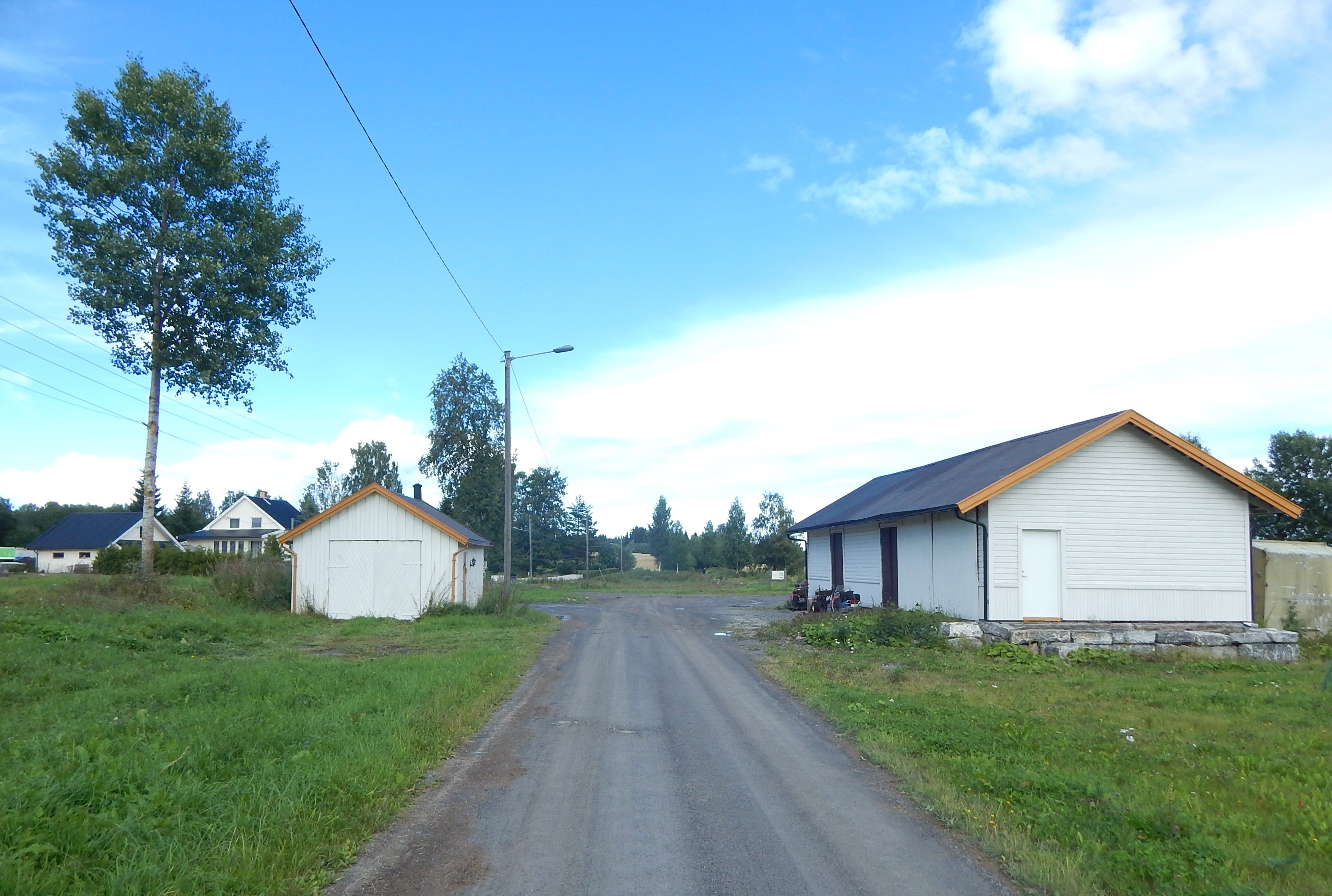 Kolbu stasjon på Skreiabanen